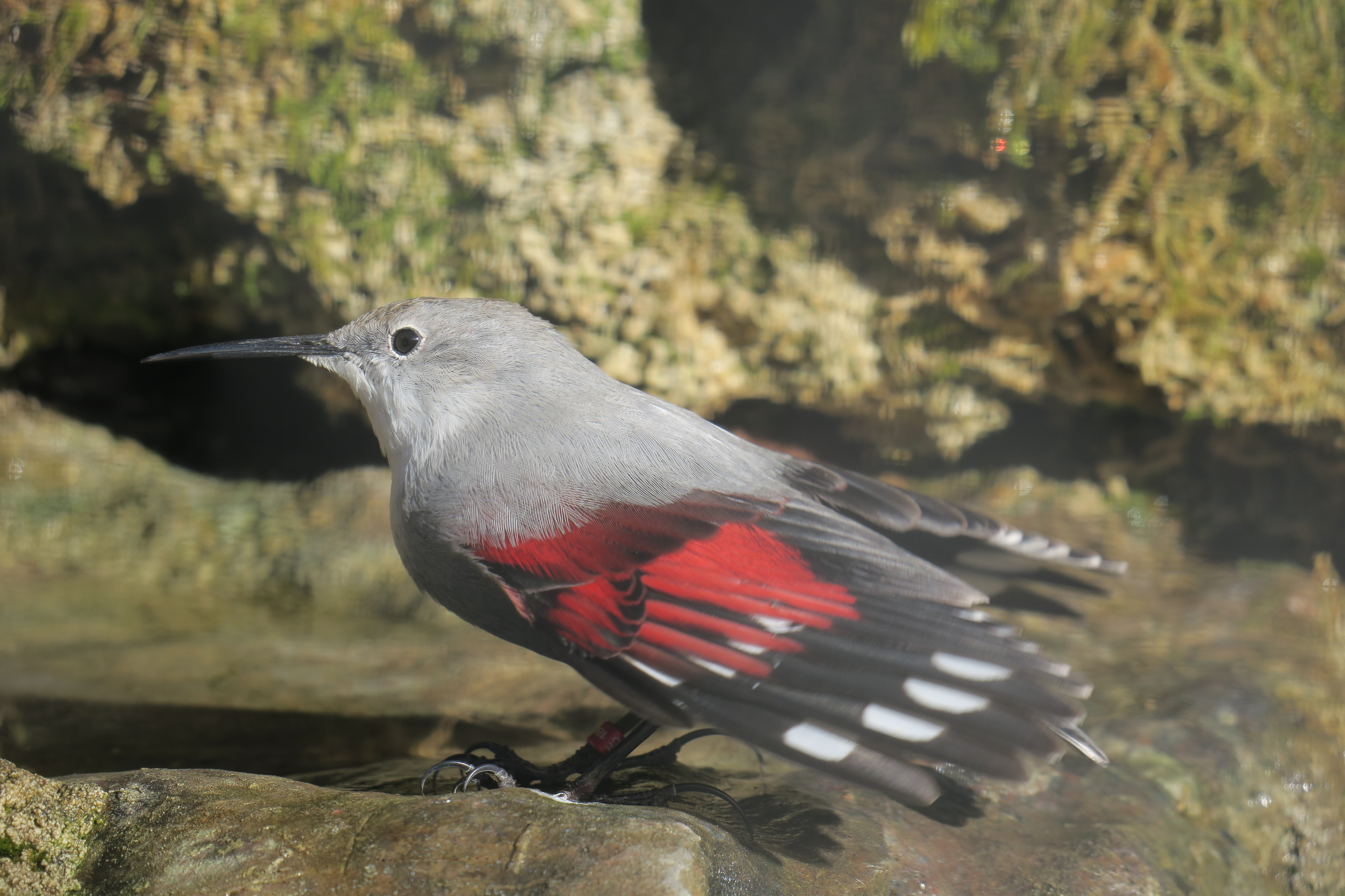 Mauerläufer aufgenommen im Alpenzoo